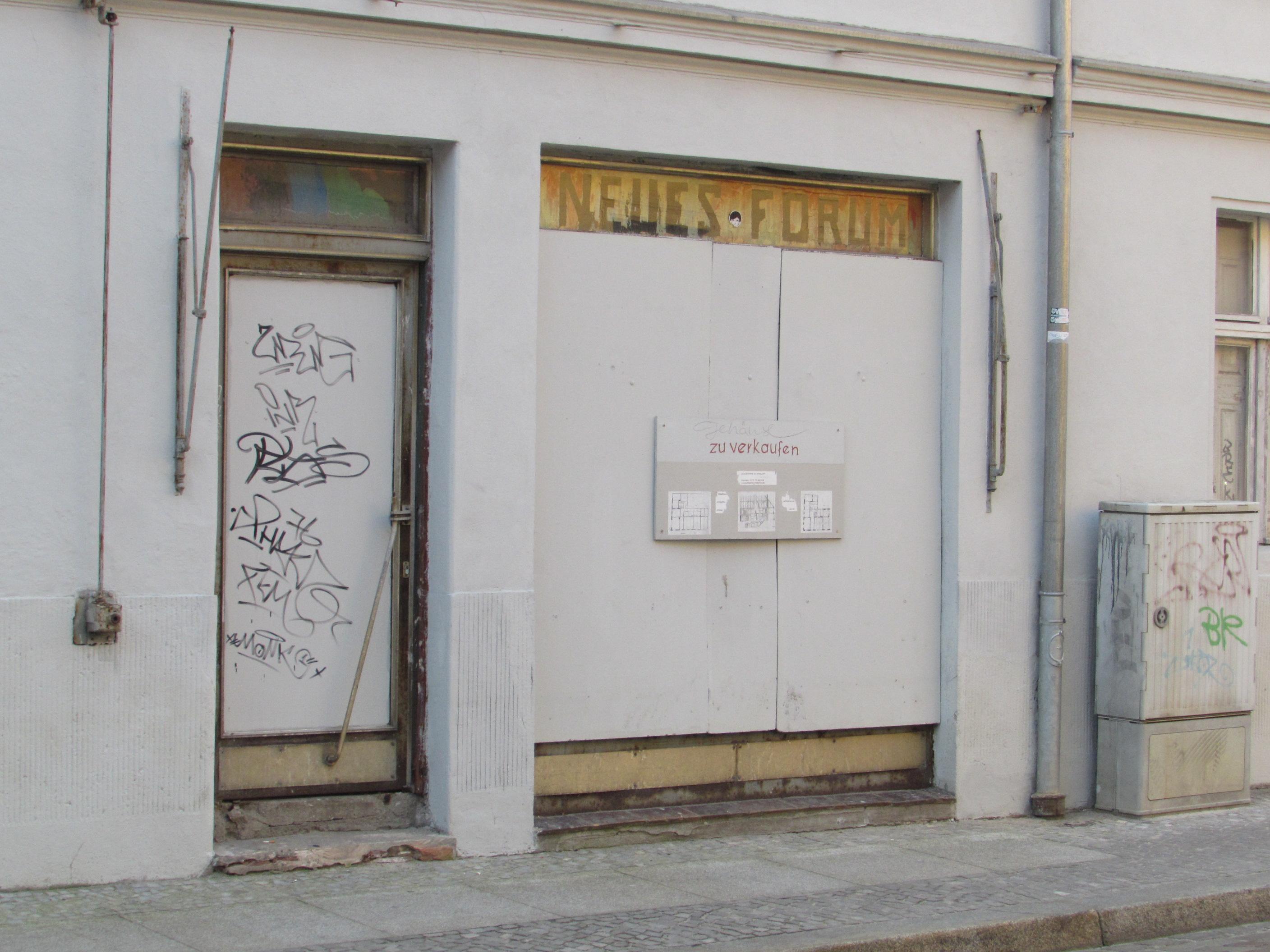 ehemaliges Parteibüro Neues Forum in Brandenburg an der Havel, Bäckerstraße